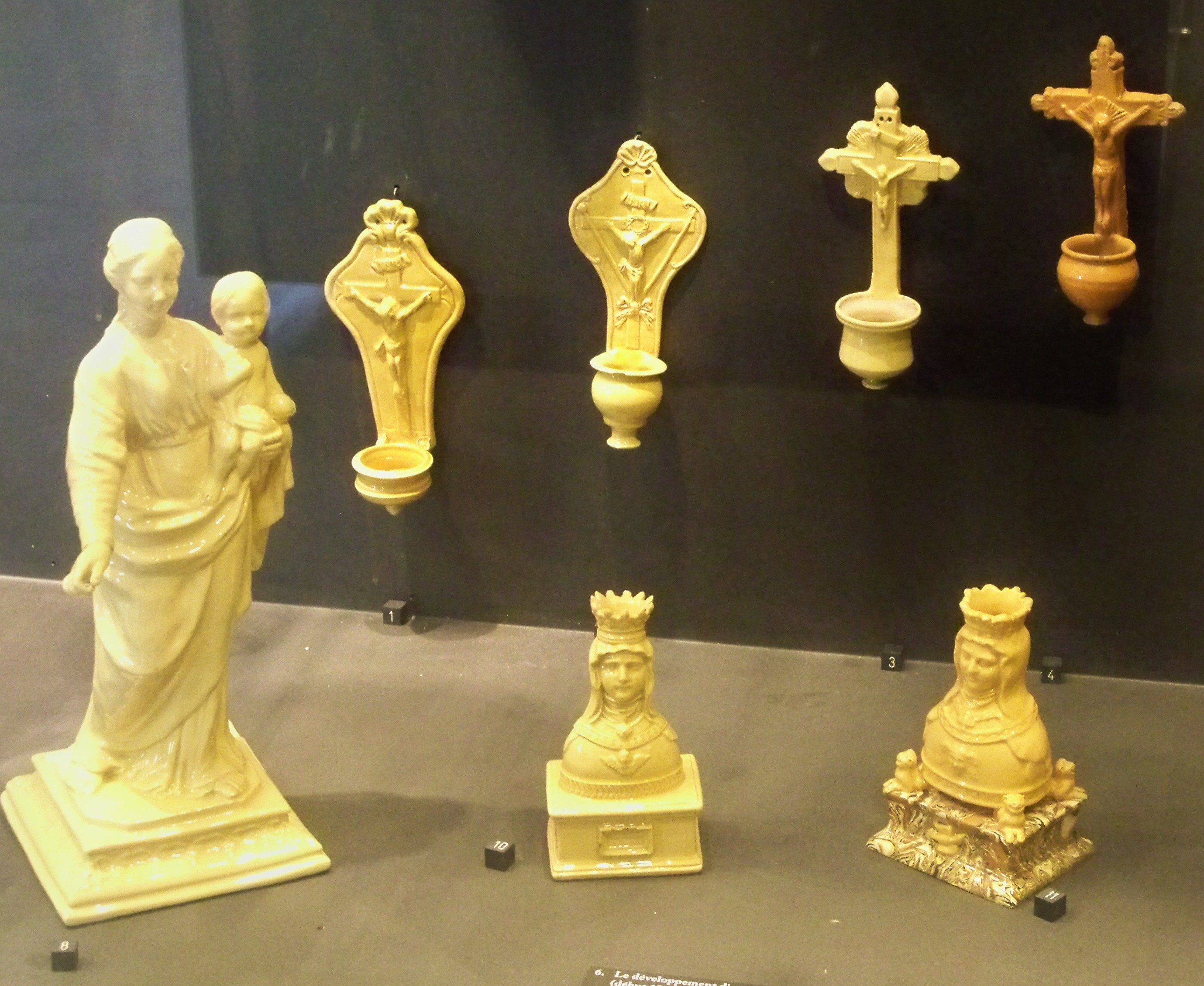 faience d'Apt (84)